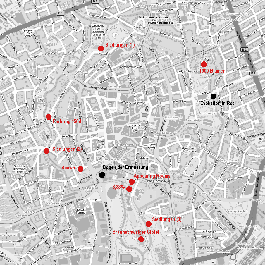 Die Projekte des Lichtparcours 2010 in Braunschweig.